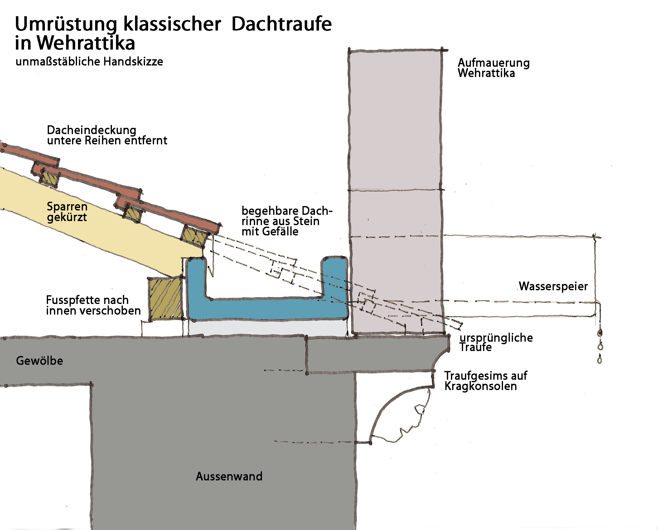 Unrüstung ehem. Dachtraufe in Wehrattika